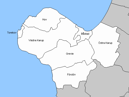 Socken in Båstad